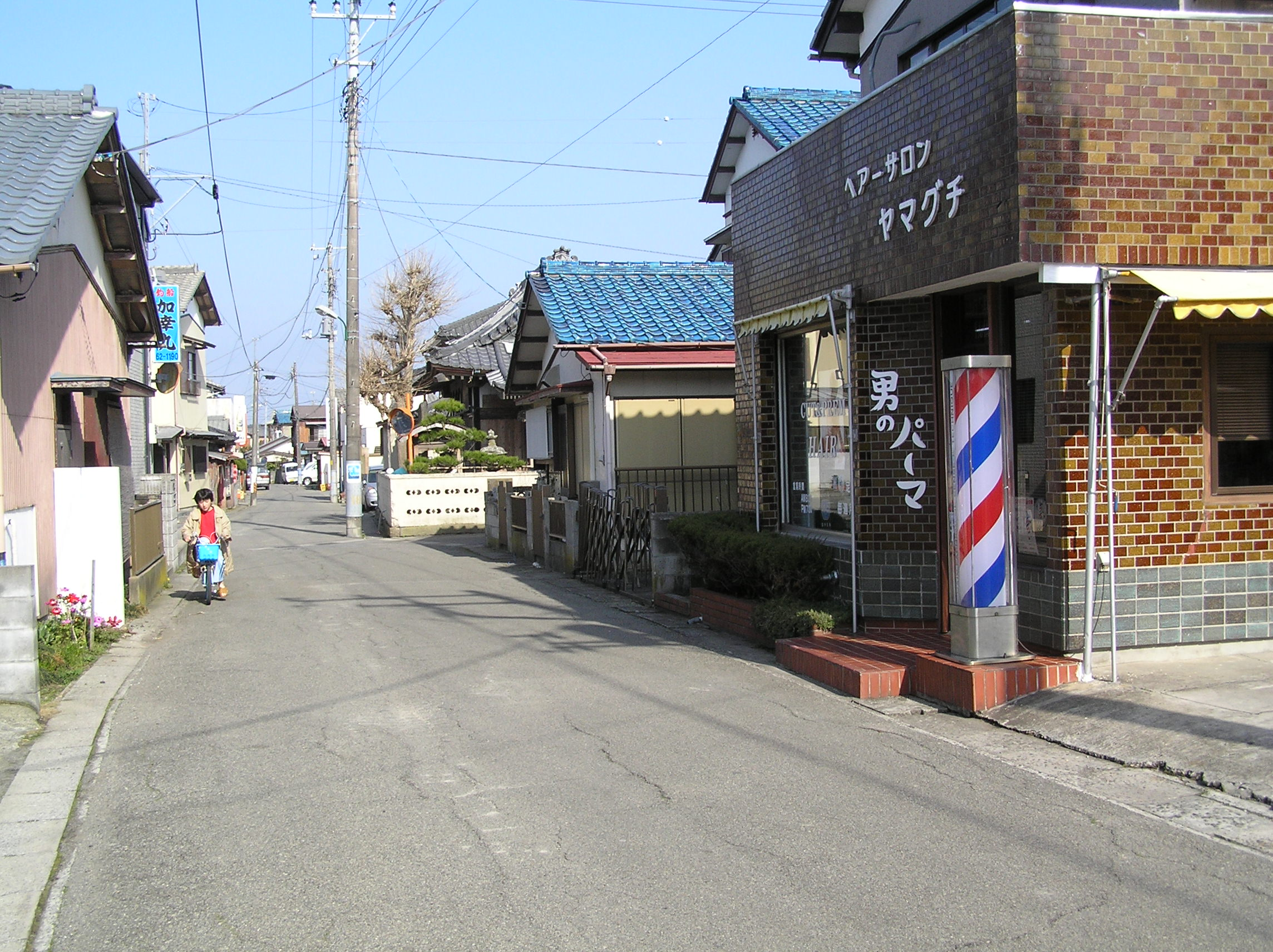 （千葉県大原）のつげ義春が幼少期を過ごしたあたりの町並み。 ～photo by Autumn Snake 【おぉたむ すねィく探検隊】写真部門 担当 大原佳苗